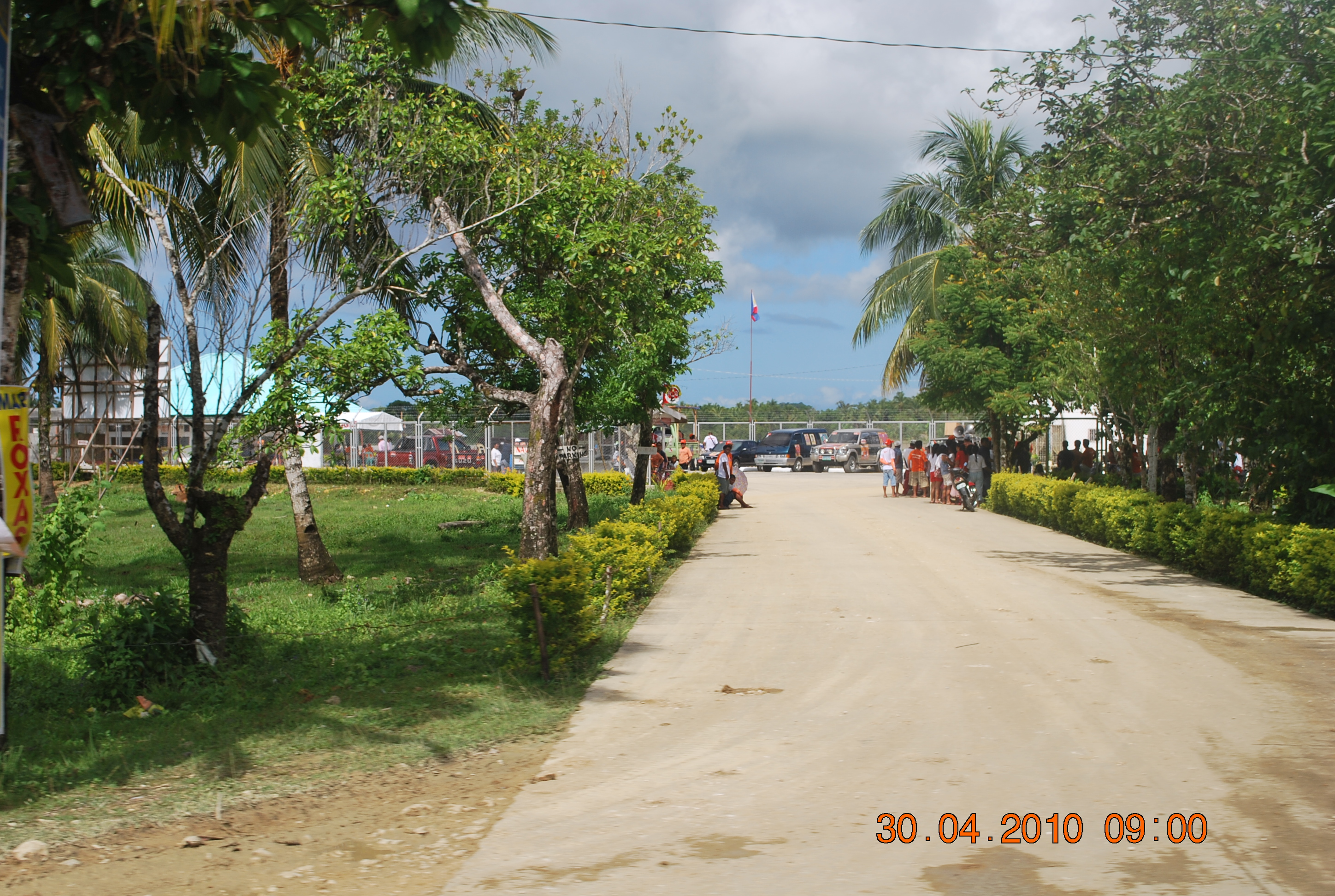 Sayak Airport